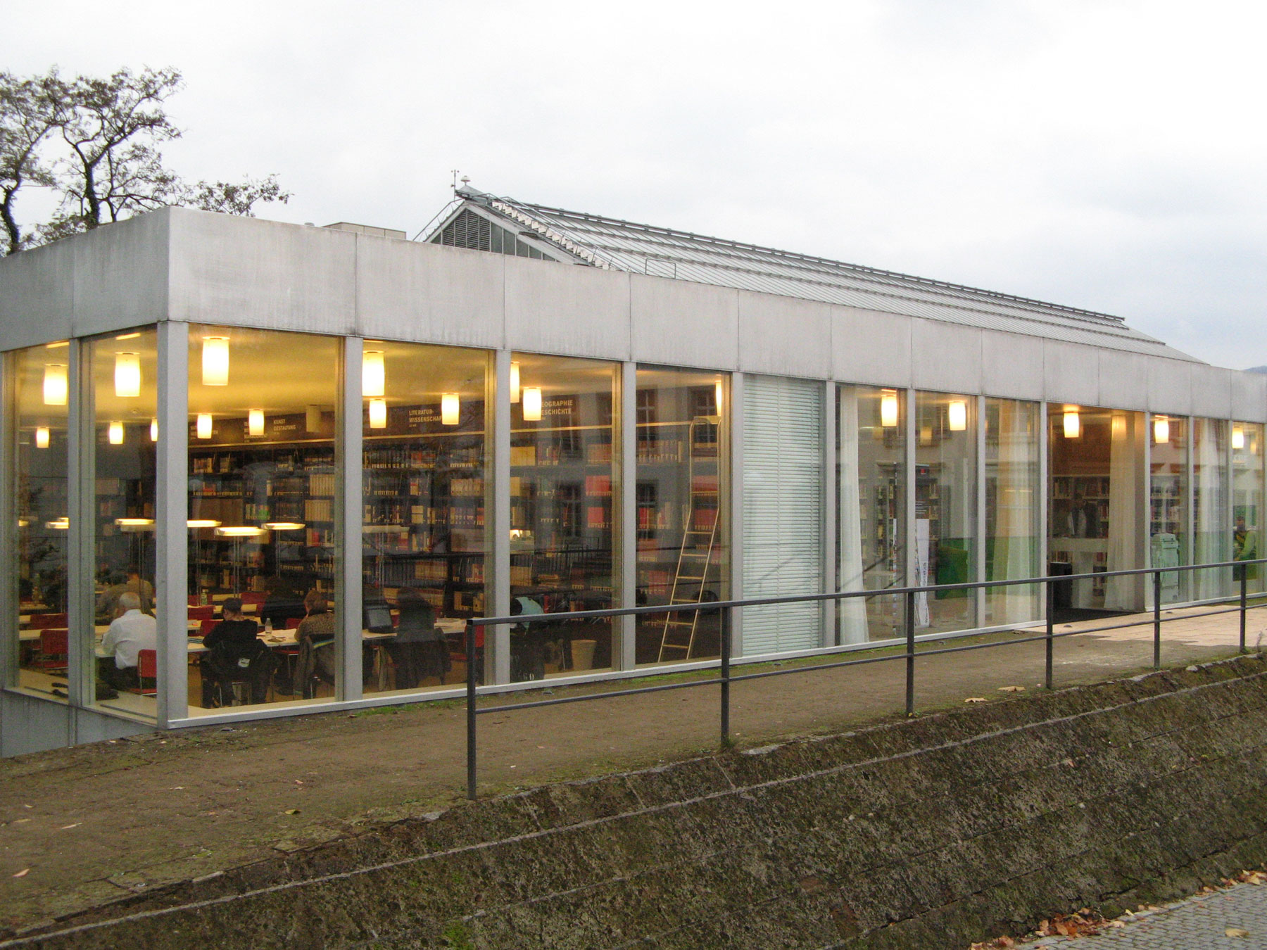 Aargauer Kantonsbibliothek in Aarau